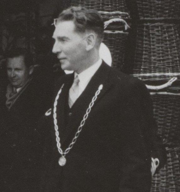 Collectie / Archief : Fotocollectie Elsevier Reportage / Serie : [ onbekend ] Beschrijving : koninklijk huis, koninginnen, openingen, veilingen, burgemeesters, commissarissen der koningin, Hogenboom B.J., Juliana, koningin, Kesper L.A. Datum : 20 mei 1954 Locatie : Ter Aar, Zuid-Holland Trefwoorden : burgemeesters, commissarissen der koningin, koninginnen, koninklijk huis, openingen, veilingen Persoonsnaam : Hogenboom B.J., Juliana, koningin, Kesper L.A. Fotograaf : Fotograaf Onbekend / Anefo Auteursrechthebbende : Nationaal Archief Materiaalsoort : Foto (zwart/wit) Nummer archiefinventaris : bekijk toegang 2.24.05.02 Bestanddeelnummer : 014-1347